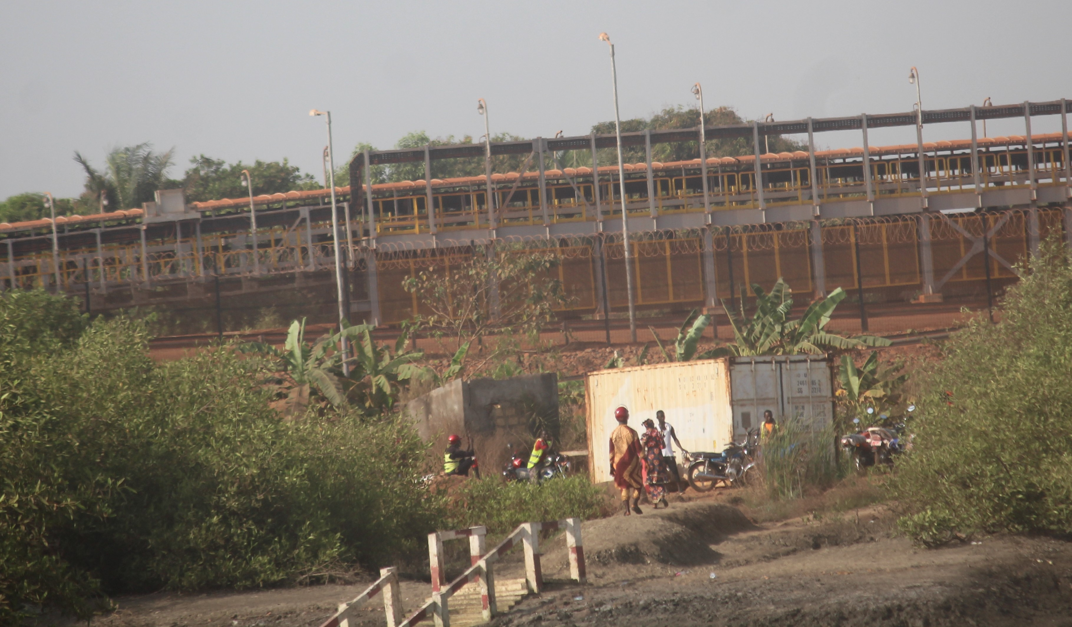 Tapis de GAC vue sur la rive a kamsar This is an image with the theme "Africa on the Move or Transport" from: Guinea